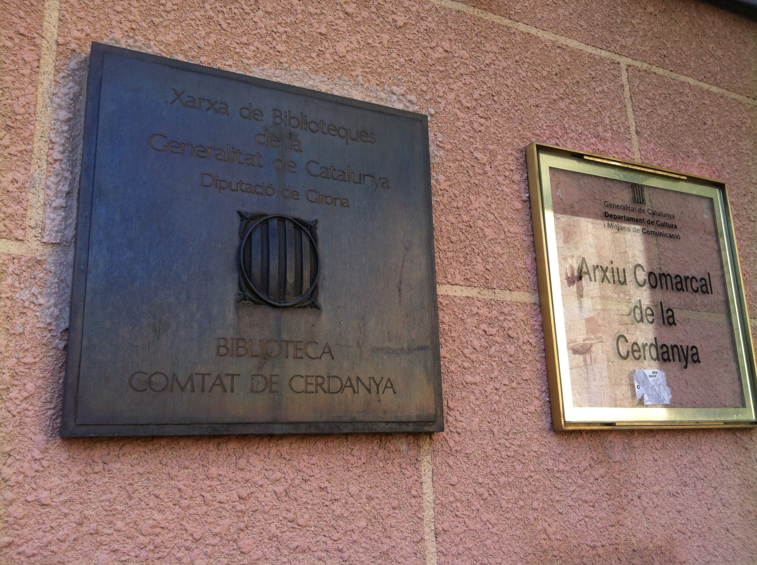 Arxiu Comarcal de la Cerdanya. Pg. del Deu d'Abril, 2 (Puigcerdà)